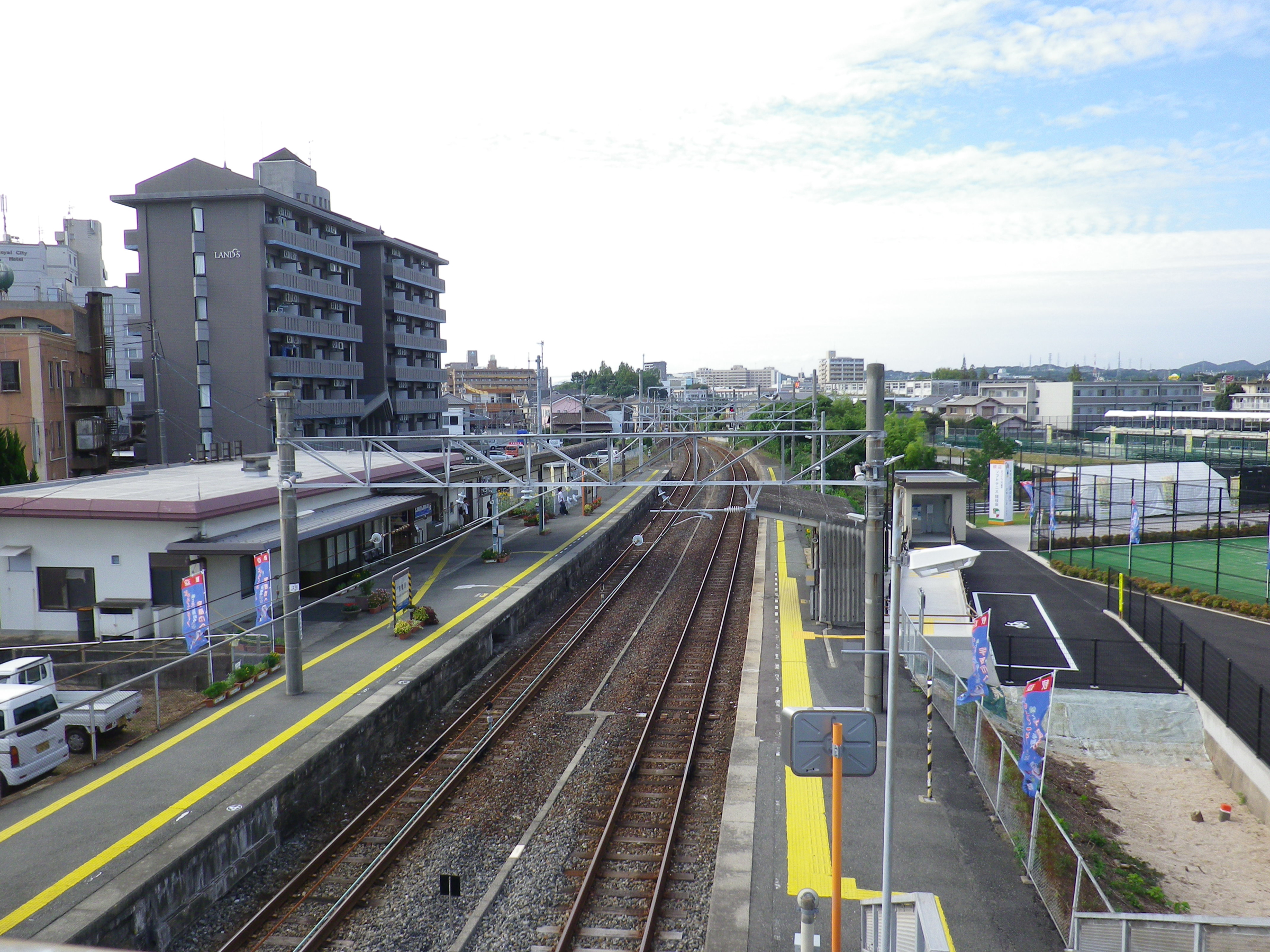 山口県宇部市。JR宇部線東新川駅プラットホーム。